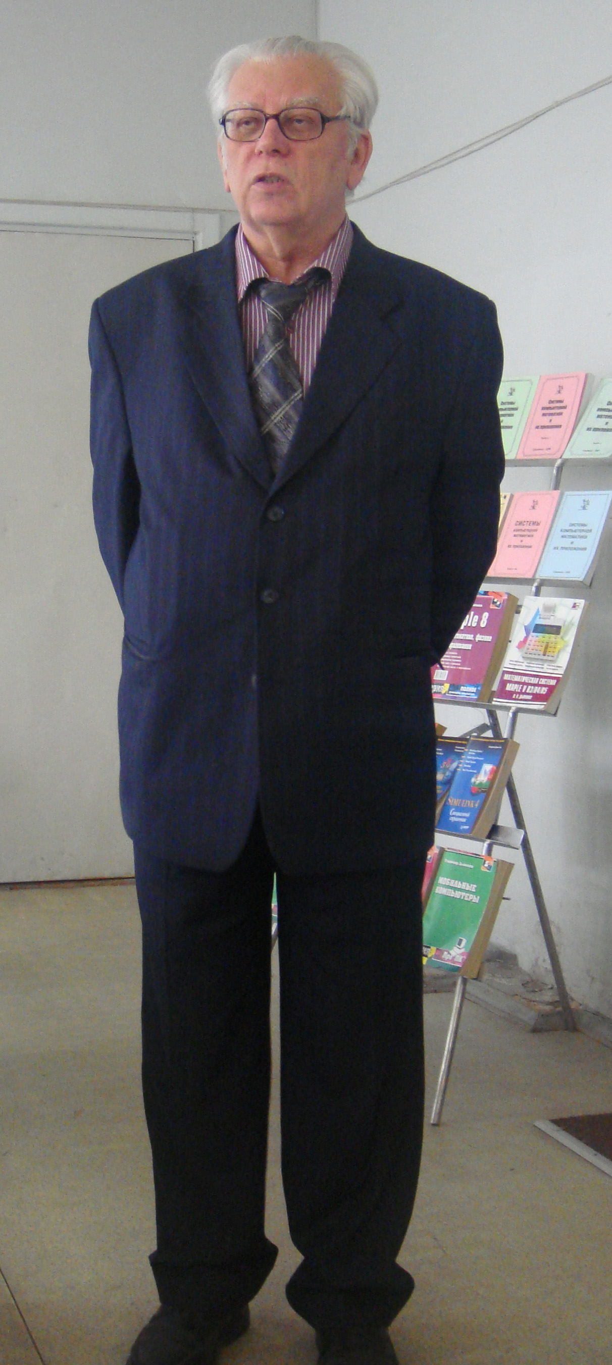 Фотография на фоне стенда с книгами